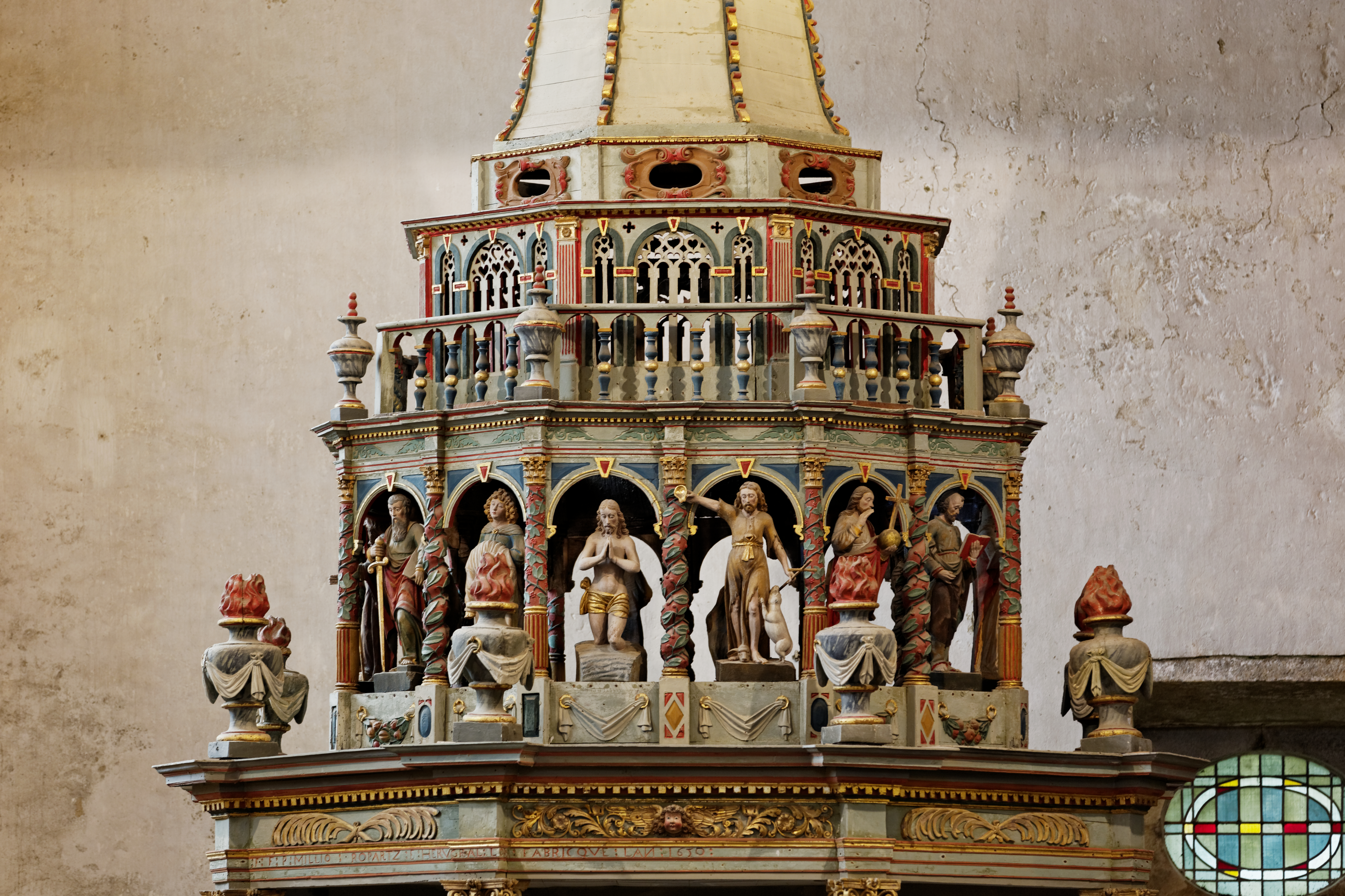 L'église Notre-Dame de l'enclos paroissial de Lampaul-Guimiliau dans le Finistère..